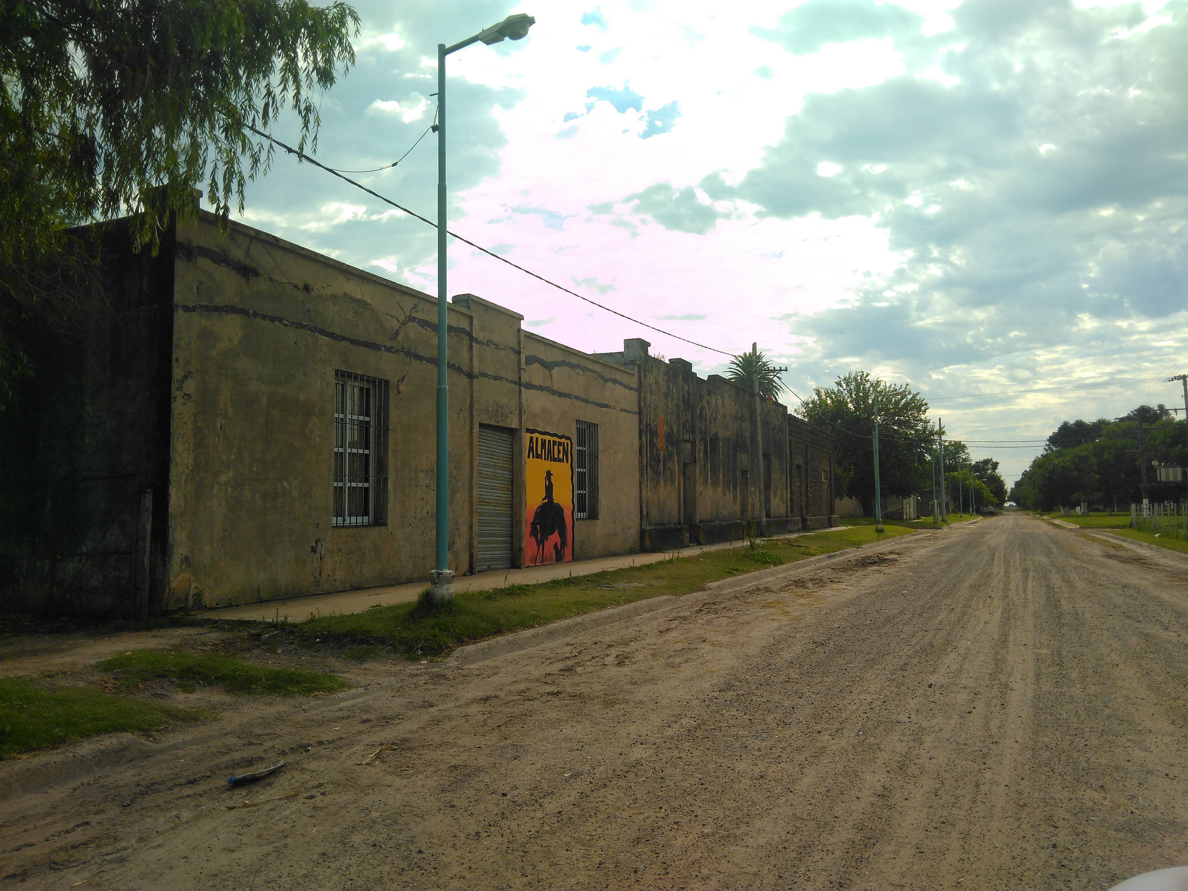 Calle de Cayastacito